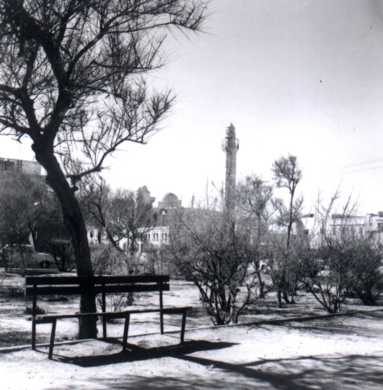 מבט למסגד חסן בק מתוך הגן